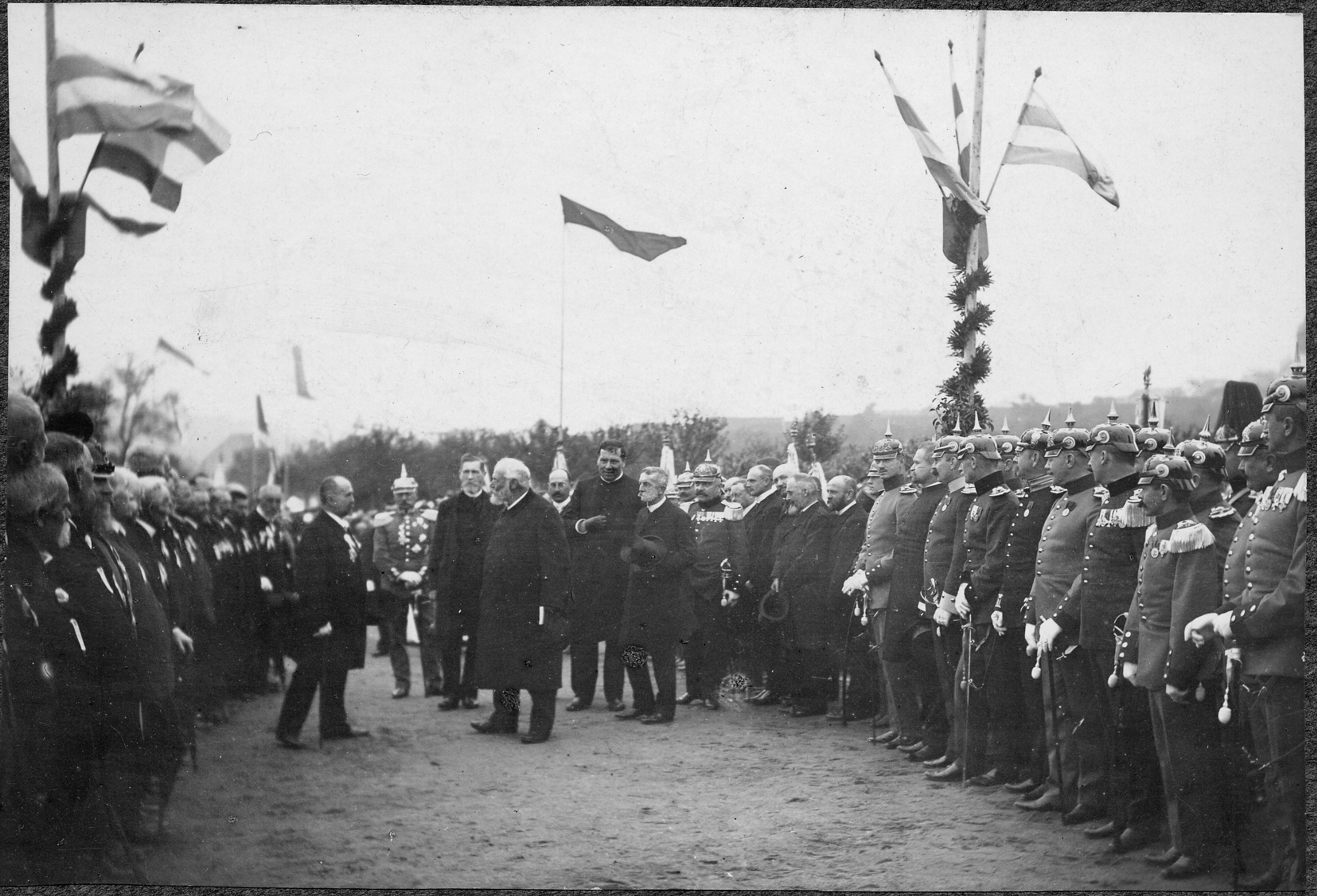 Das Bild zeigt das Abschreiten einer Ehrenformation durch Prinz Ludwig von Bayern, dem späteren Ludwig III. von Bayern, während eines Festakts anlässlich der Enthüllung des Prinz-Ludwig-Denkmals am 3. Oktober 1909 in Helmstadt, Bayern. Während des Deutschen Krieges von 1866 fand am 25. Juli 1866 in der Nähe des Ortes eine Schlacht zwischen preußischen und mit Österreich verbündeten bayrischen Truppen statt, bei der Prinz Ludwig von Bayern eine Schussverletzung erlitt. Die Zeremonie fand unter Anwesenheit von Veteranen des Krieges von 1866 statt.